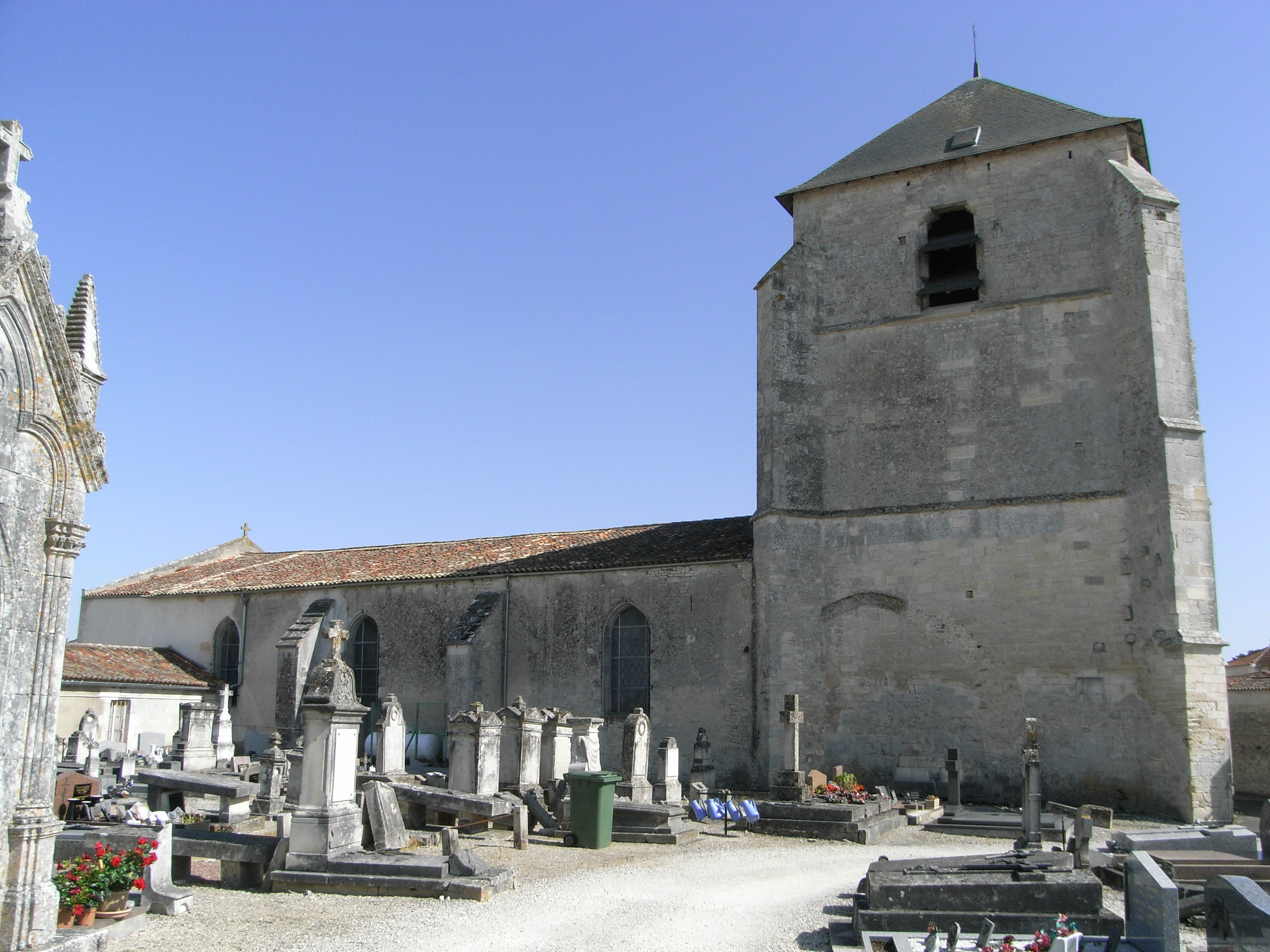 Église Sainte-Madeleine de La Jarrie, commune de Charente-Maritime en France (vue nord).